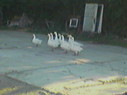 goose